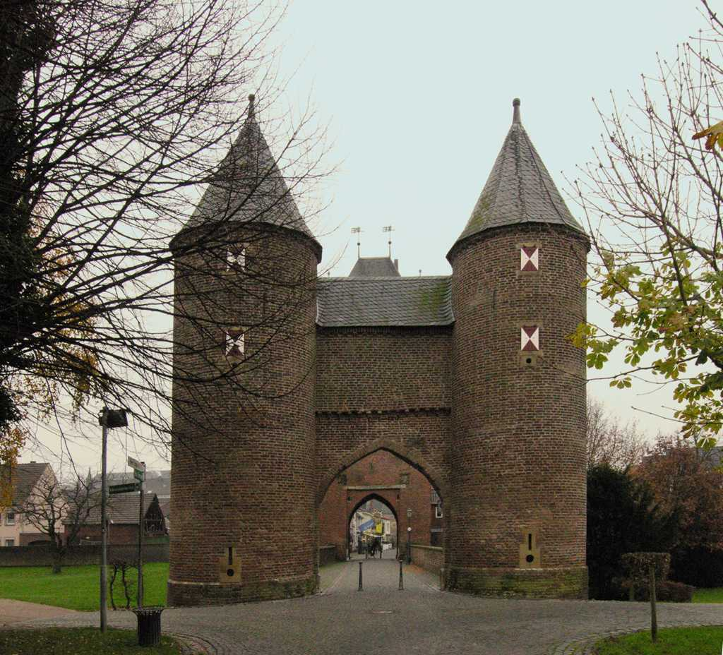 Xanten, Klever Tor, von außerhalb der Stadt gesehen